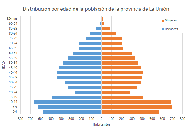 Gráfico poblacional hecho a partir de los datos arrojados por el Censo peruano del 2017